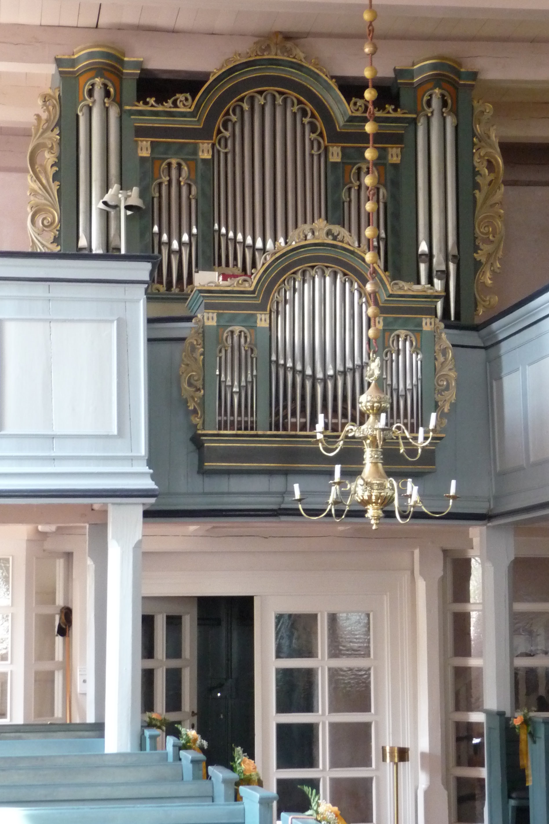 Orgel in Leerhafe